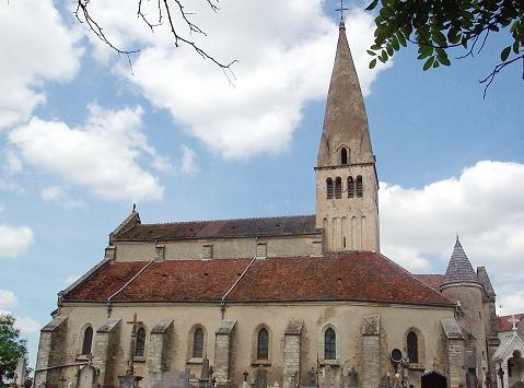 Bligny-sur-Ouche (Côte-d'Or, France), église Saint-Germain-d'Auxerre, ancienne chapelle du château.